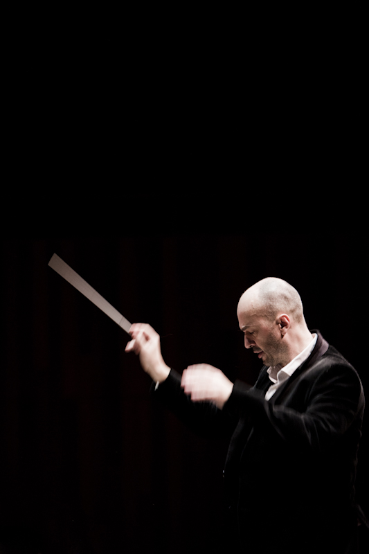 Juan Bautista Otero, Director